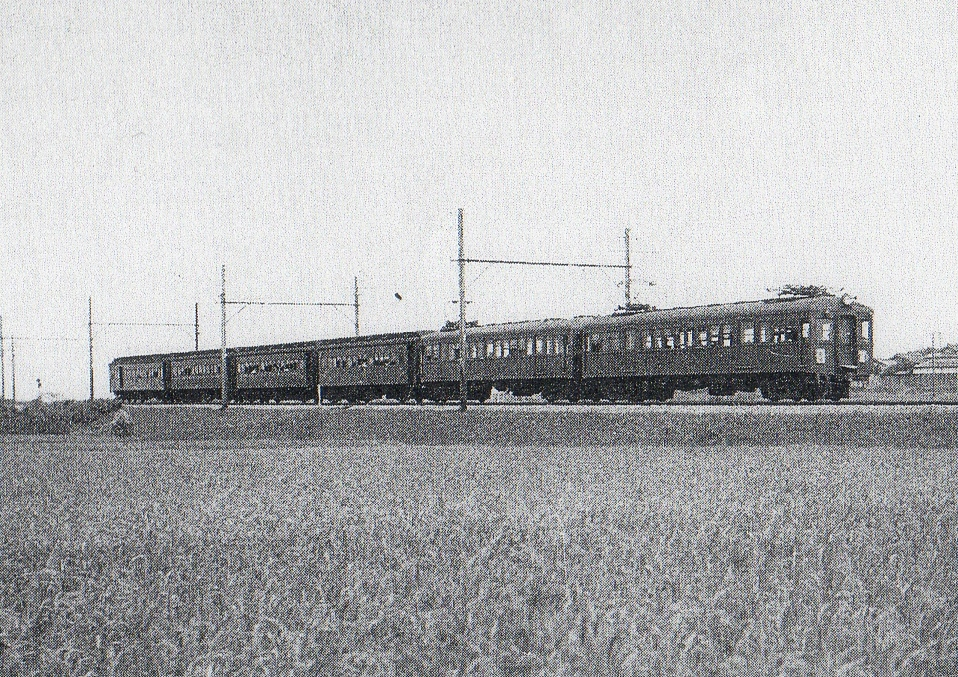 富木付近の「黒潮」号